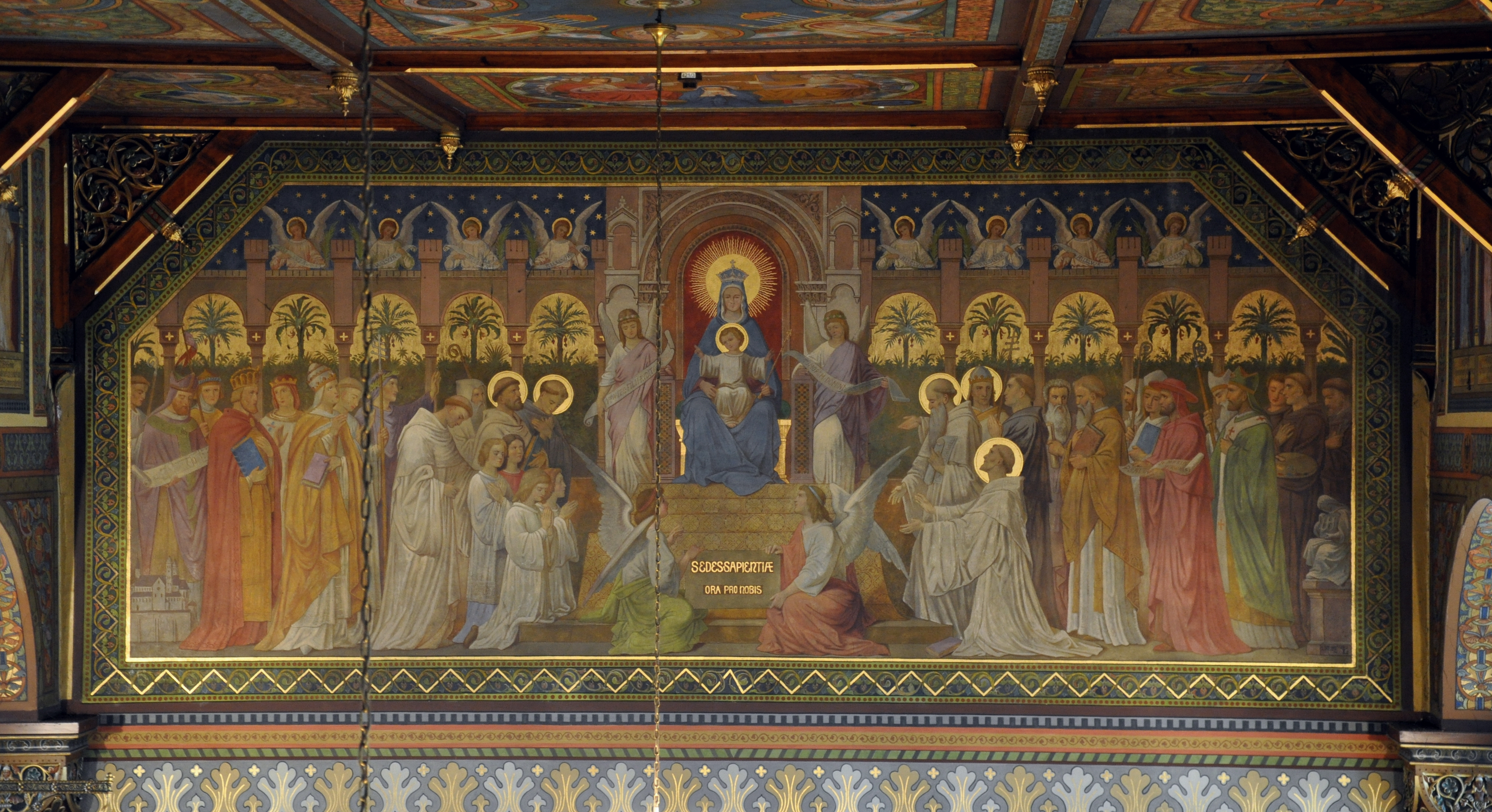 Kloster Mehrerau, Bregenz, Vorarlberg; Collegiumskapelle; Gemälde von Franz Xaver Kolb, 1887: Gemälde an der Stirnseite der Kapelle: Sedes sapientiae